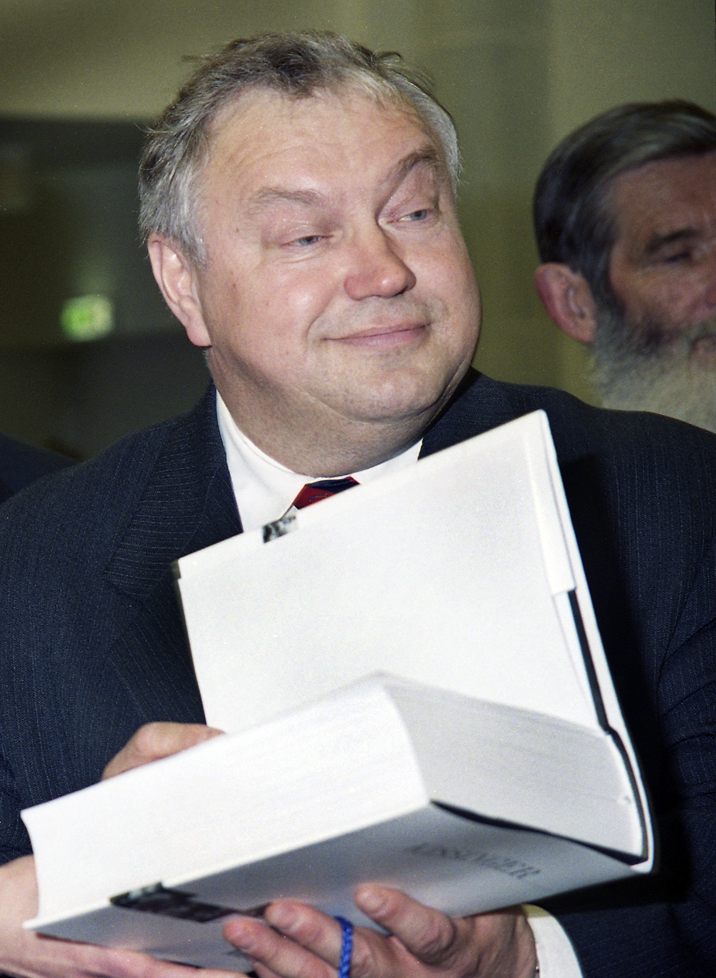 Villu Reiljan, Eesti ettevõtja ja endine poliitik 2001